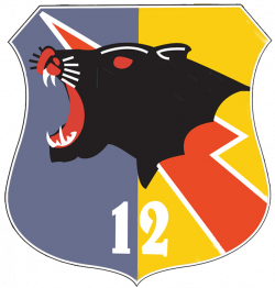 Gambar ini adalah Lambang Skuadron Udara 12, Koops AU I